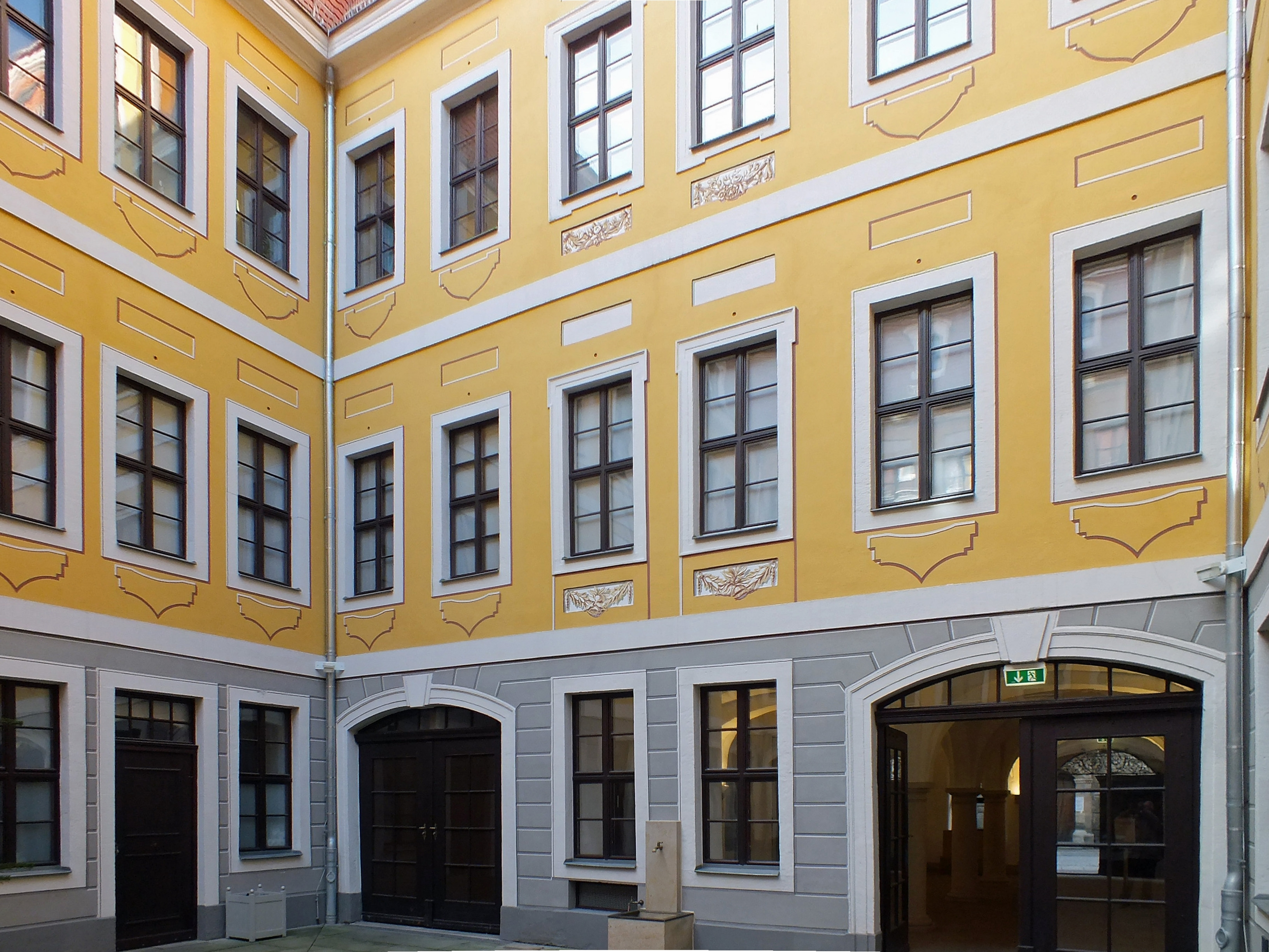 Der Hofbereich des Bosehauses in Leipzig